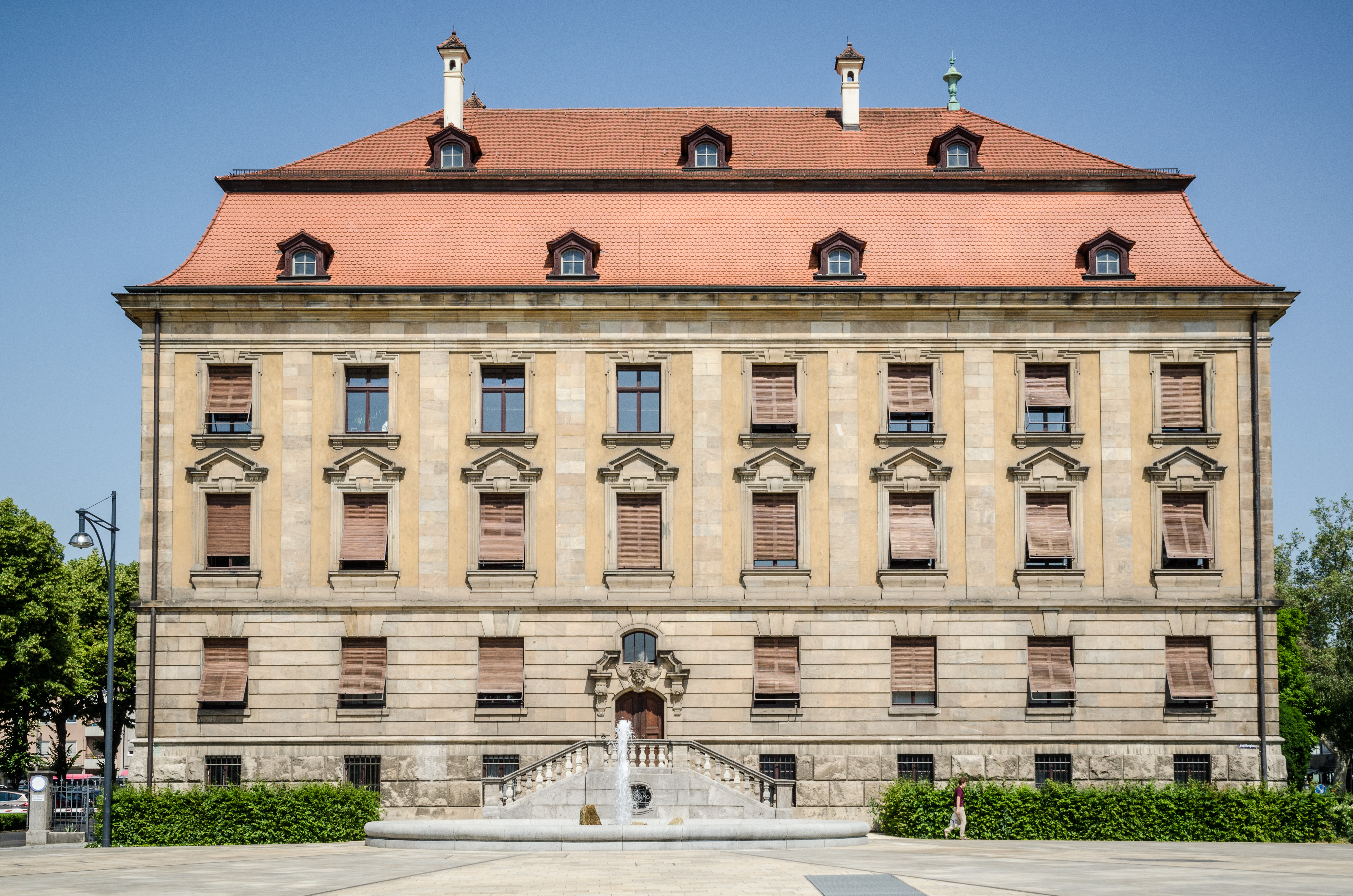 Schweinfurt, Rüfferstraße 1